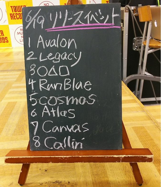 amiinAセトリボード(20170619(1))